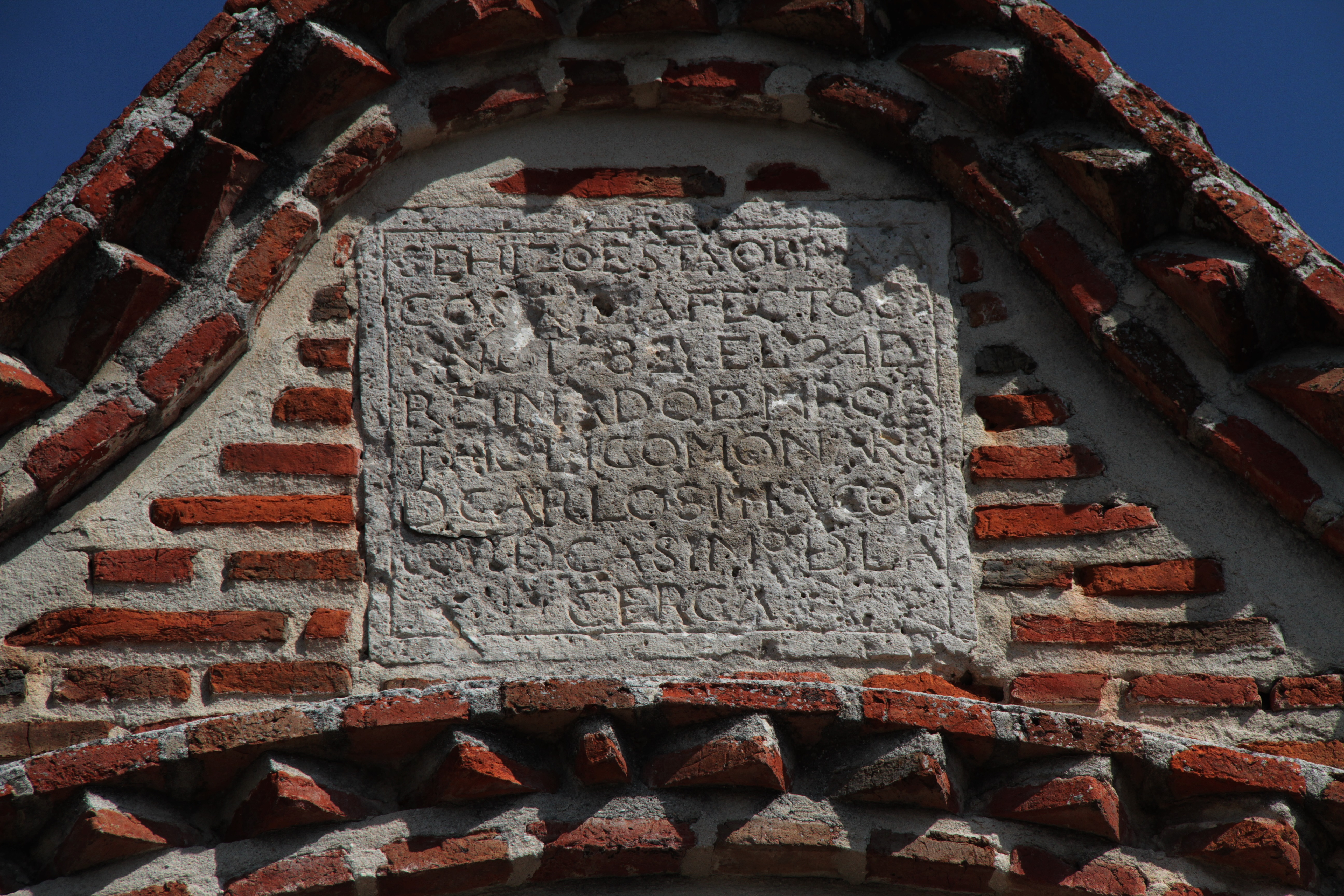 La inscripción culmina el conjunto de Los Arcos, formado por tres arcos de ladrillo que dan entrada a la plaza del ayuntamiento de Portillo, en el cerro amurallado. Hay un intento de transcripción del texto en